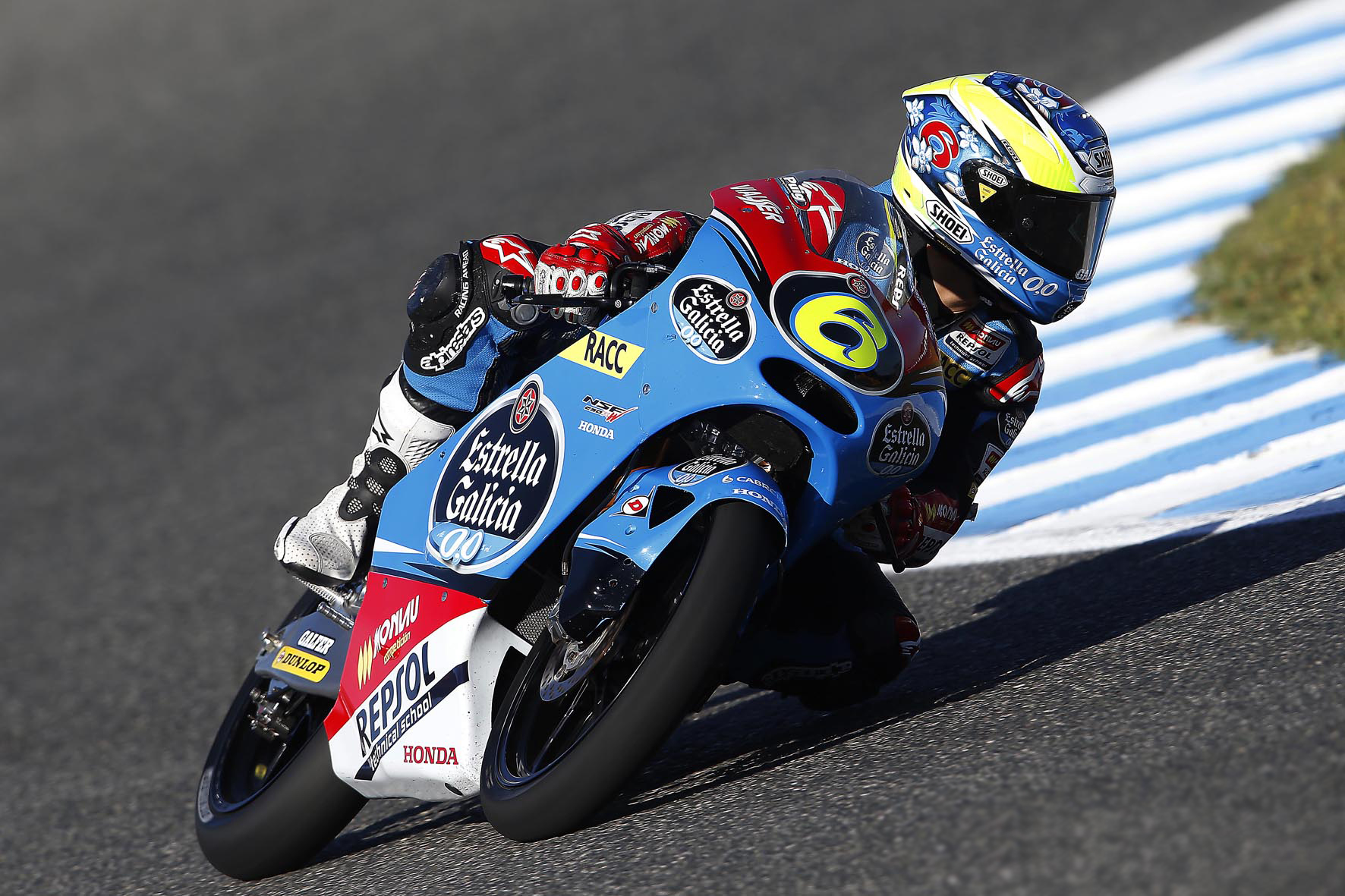 María Herrera rodando en los FP3 en la jornada matinal del Sábado del GP de Jerez del Mundial de Moto3 de 2014, carrera en la que participó como Wild Card.